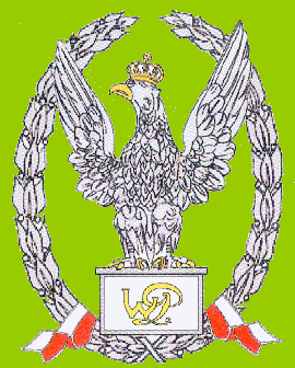 Odznaka Wzorowego Podchorążego z 2002